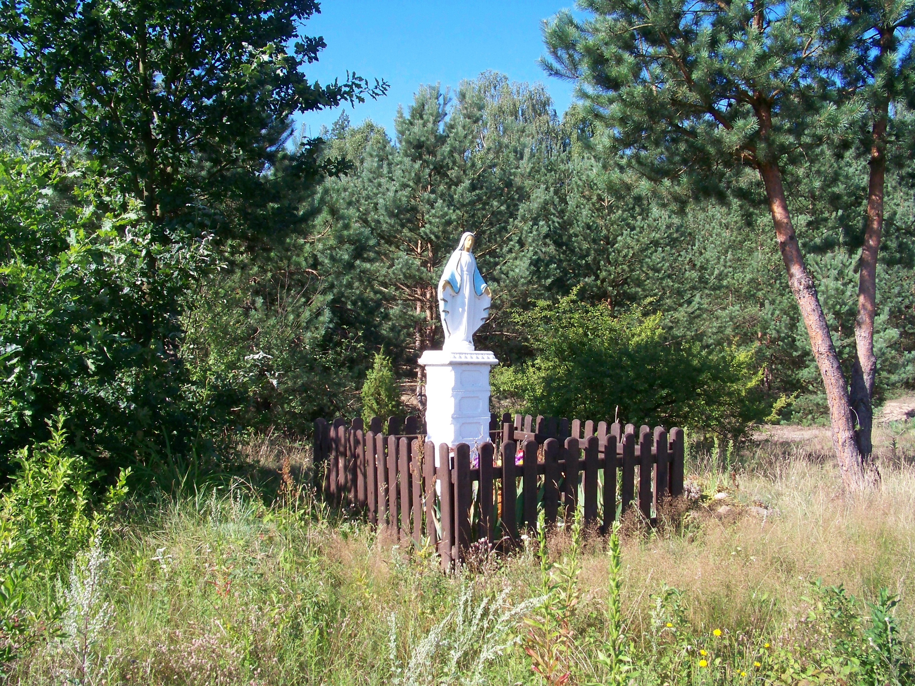 Józefówek - Kapliczka (Gmina Jedlińsk)